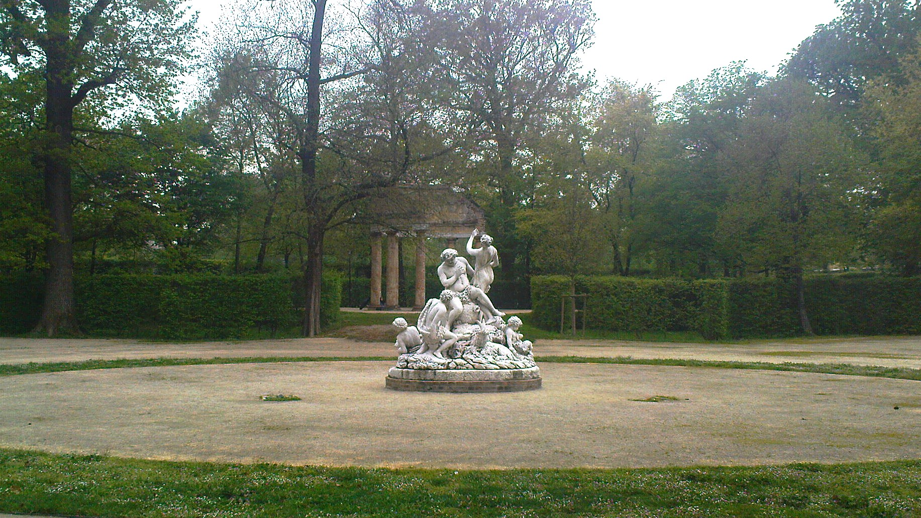 Parco Ducale a Parma. In primo piano la statua di Sileno ed Egle (Jean Baptiste Boudard, 1785) sul fondo il Tempietto d'Arcadia (1769) creato dal Patitot